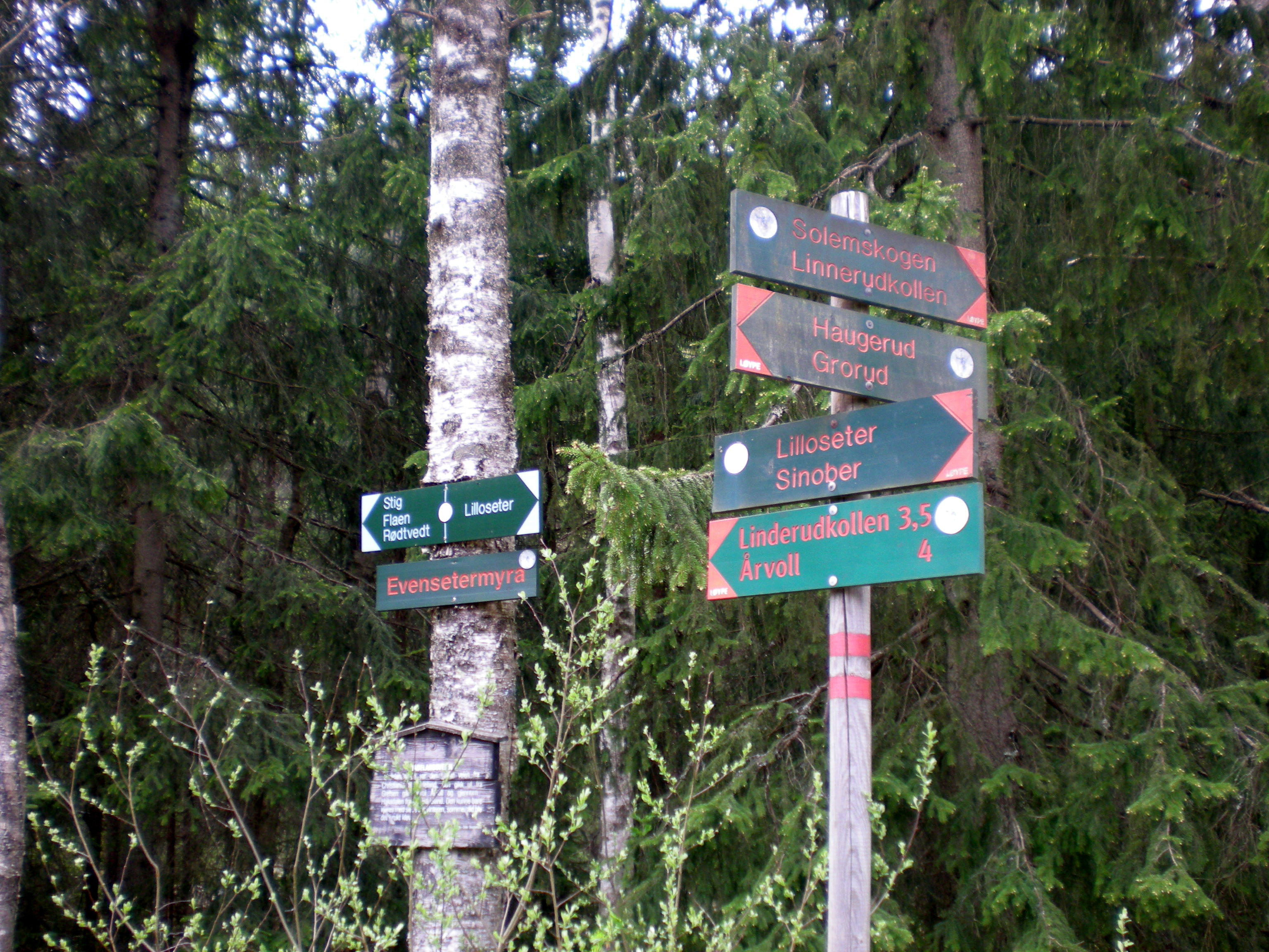 Signpost in Lillomarka, Oslo